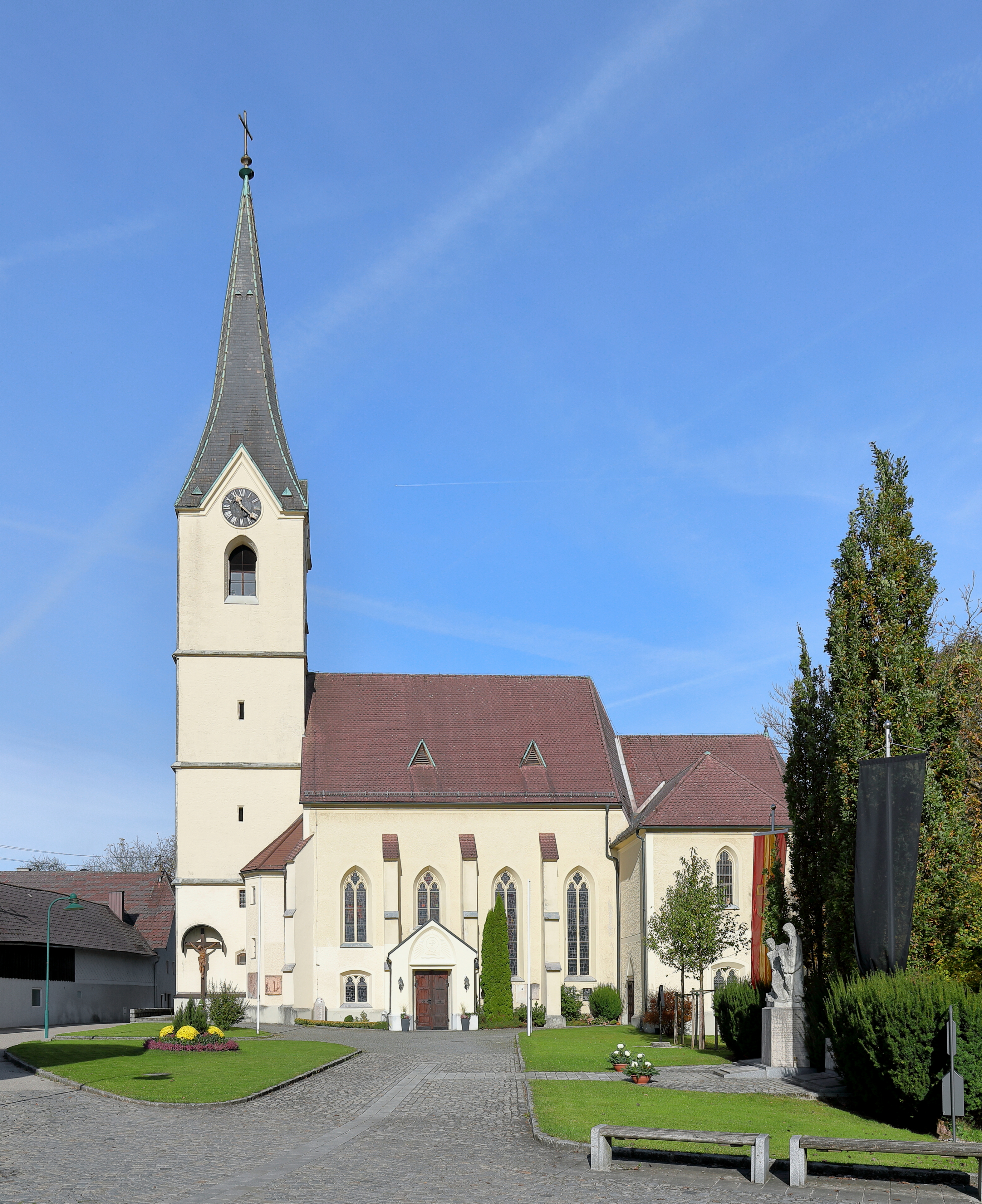 Südansicht der röm.-kath. Pfarrkirche hl. Petrus in der oberösterreichischen Marktgemeinde Regau.Eine zweischiffige spätgotische Kirche, die von 1885 bis 1887 durchgreifend umgebaut wurde. Der Westturm ist mit 1494 datiert, wobei der Spitzhelm aus neuerer Zeit stammt.